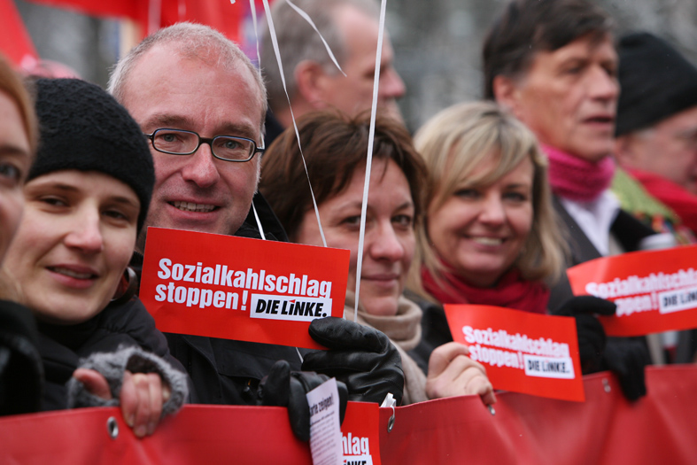 v.l.v.r. Caren Lay (halb verdeckt), Katja Kipping, Matthias W. Birkwald, Cornelia Möhring, Kathrin Senger-Schäfer, Ulrich Maurer, Mitglieder der Fraktion DIE LINKE. im Bundestag, zeigen die rote Karte mit der Aufschrift Sozialkahlschlag stoppen. Abgeordnete der Fraktion DIE LINKE. im Bundestag protestierten gemeinsam mit hiunderten anderer Demonstrierender vor dem Brandenburger Tor in Berlin gegen das Sparpaket der Bundesregierung, über das am gleichen Tag der Bundestag beriet. (26.11.2010)